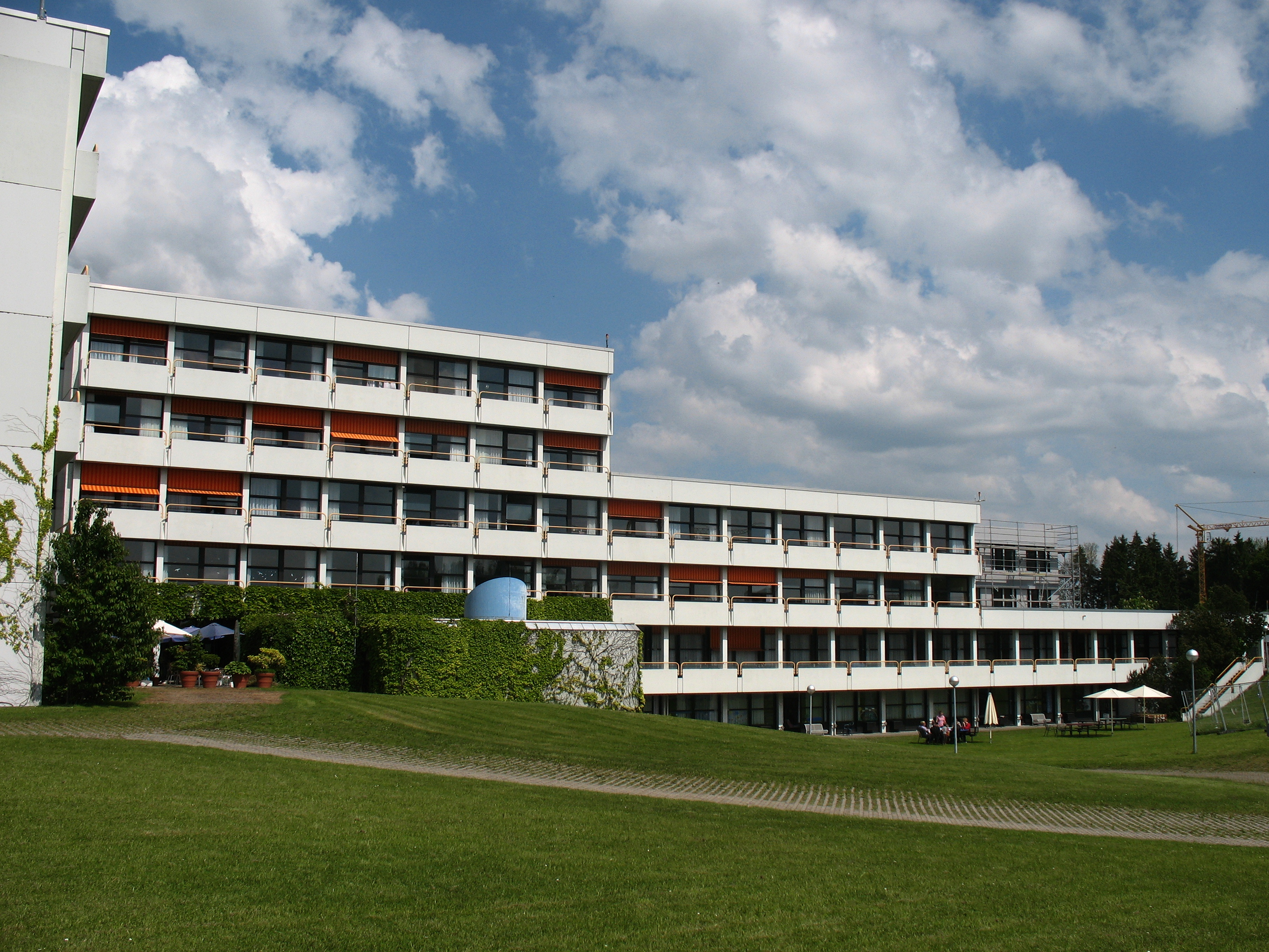 Der Südflügel des Hauptgebäudes des Klinikum Friedrichshafen in der Westansicht.